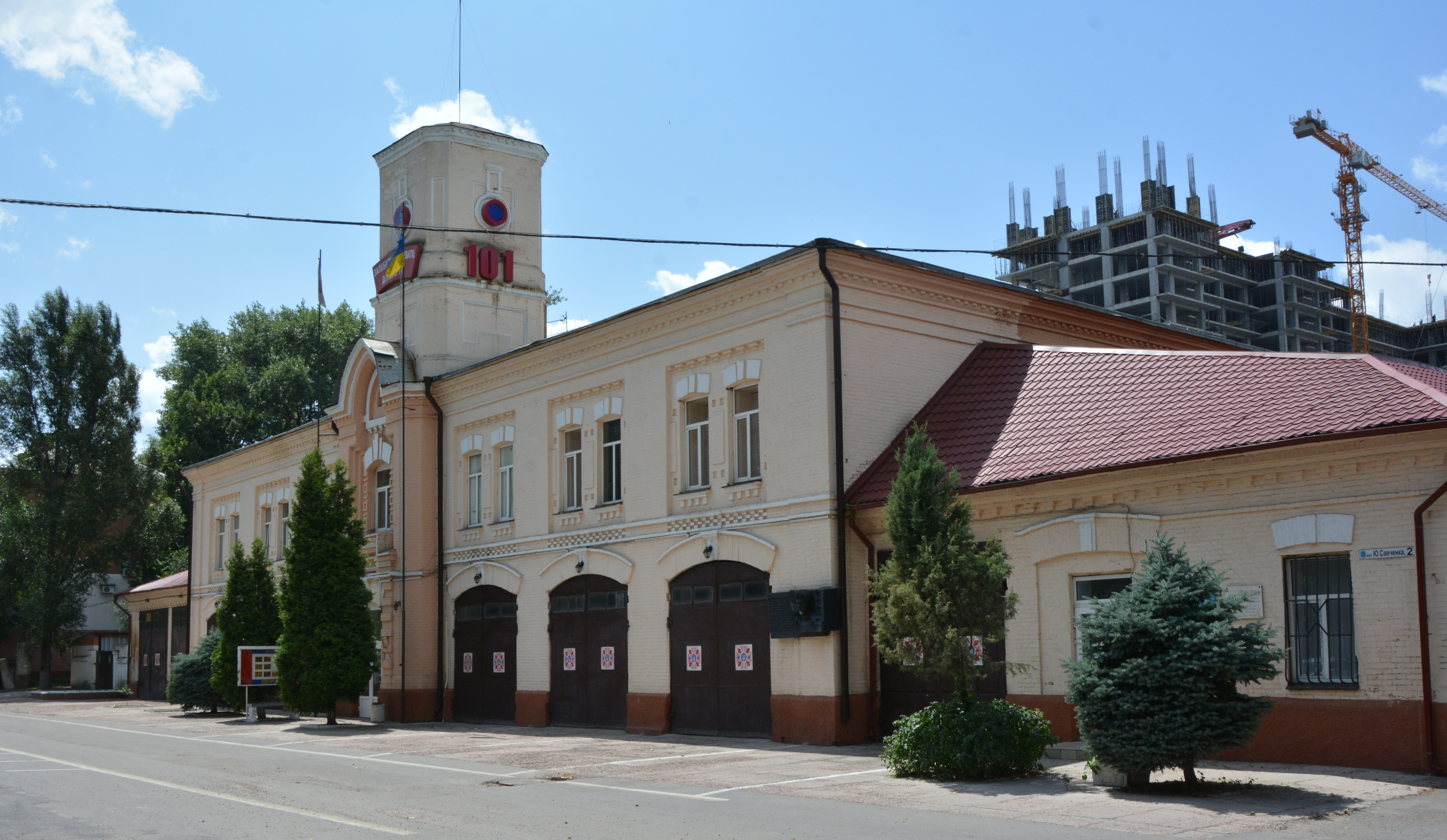 Будинок першої пожежної частини -будівля колишньої 4-ї поліцейської дільниці, де утримували І. Бабушкіна та були страчені 8 учасників Горлівського збройного повстання Мем. дошка, Дніпропетровськ, Савченка вул., 2